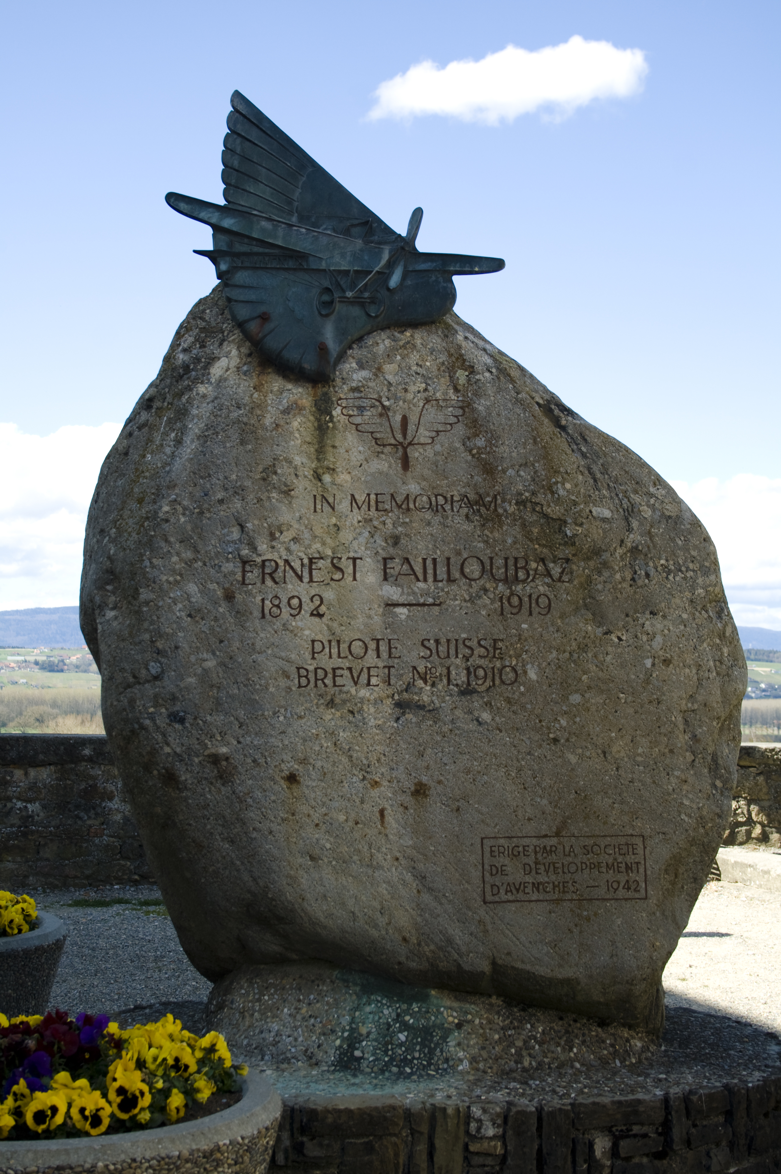 Stèle en l'honneur d'Ernest Failloubaz, premier aviateur suisse, à Avenches en Suisse.